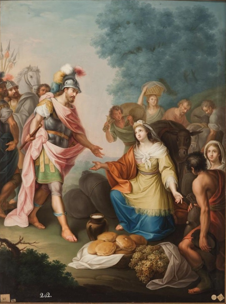 La obra representa a la prudente Abigaíl entregando provisiones a David, el futuro rey de Israel.